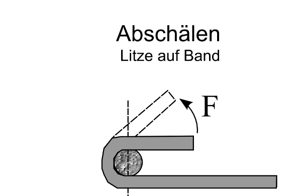 Prüfung von Kleinteilschweißverbindungen: Abschälen